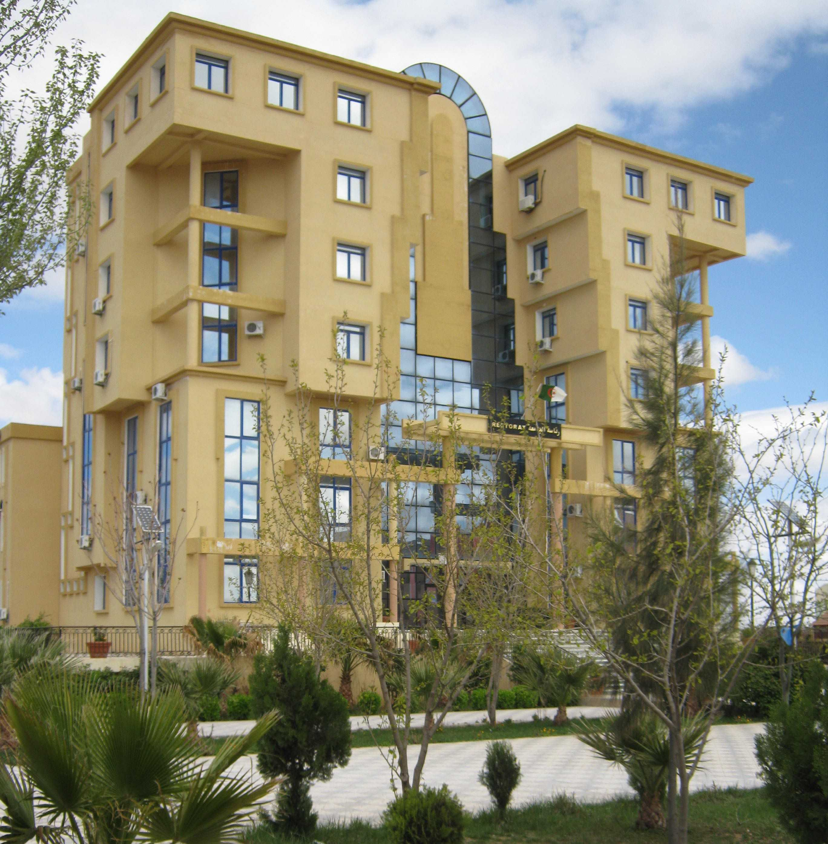 رئاسة الجامعة